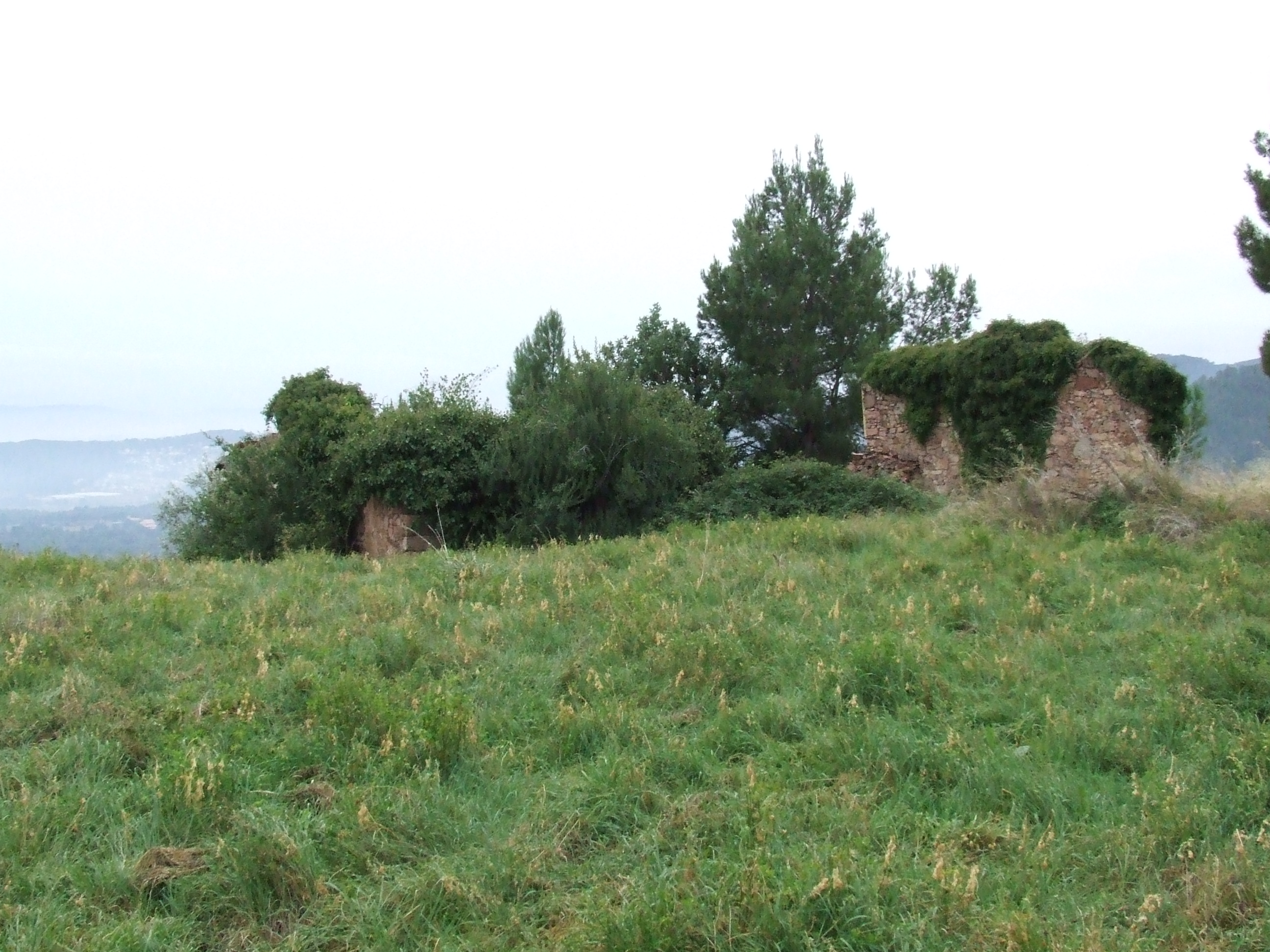 Can Vileu (Riells del Fai, Bigues i Riells, Vallès Oriental)